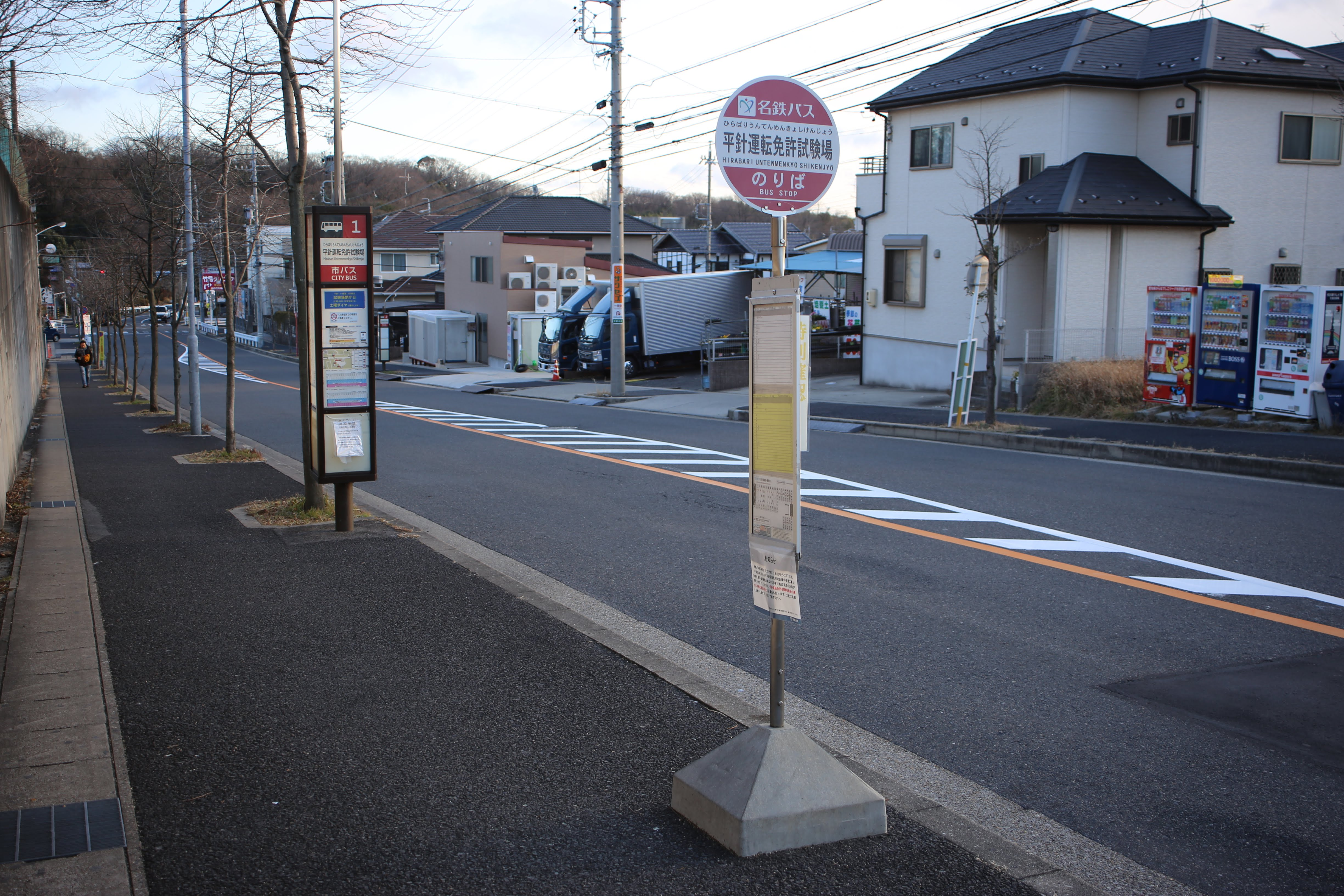 名鉄バス・名古屋市営バス「平針運転免許試験場」停留所